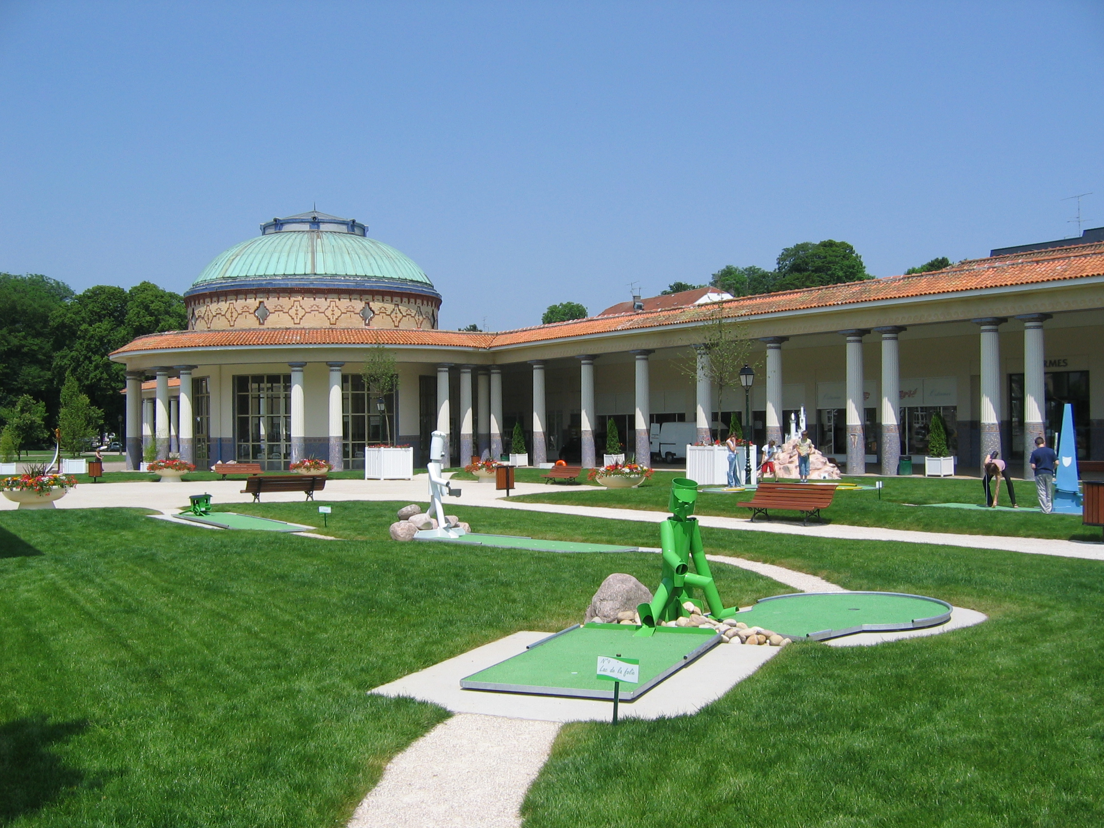 La Rotonde et les galeries des thermes de Contrexéville, Vosges, Lorraine, France